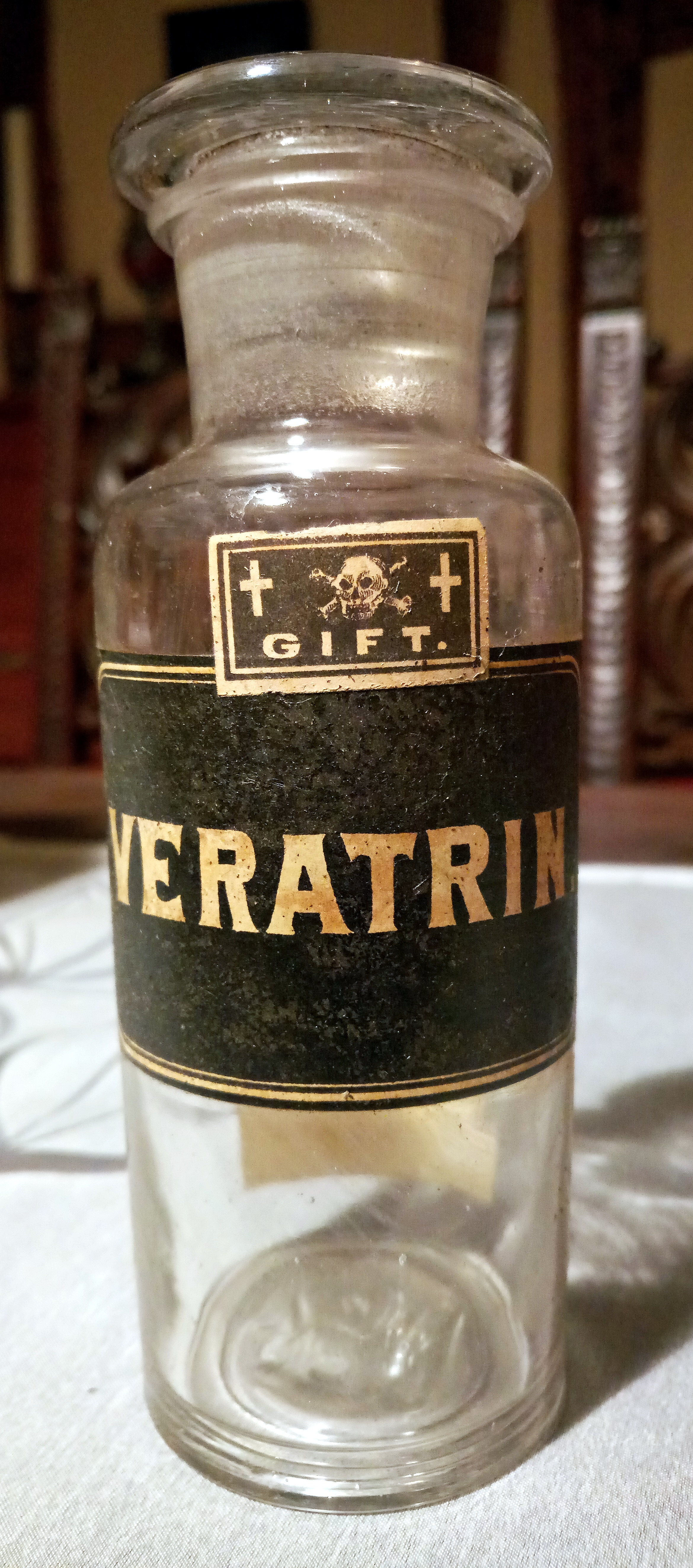 Veratrin-Glas um 1900 (aus der Schwanen-Apotheke Grünstadt)